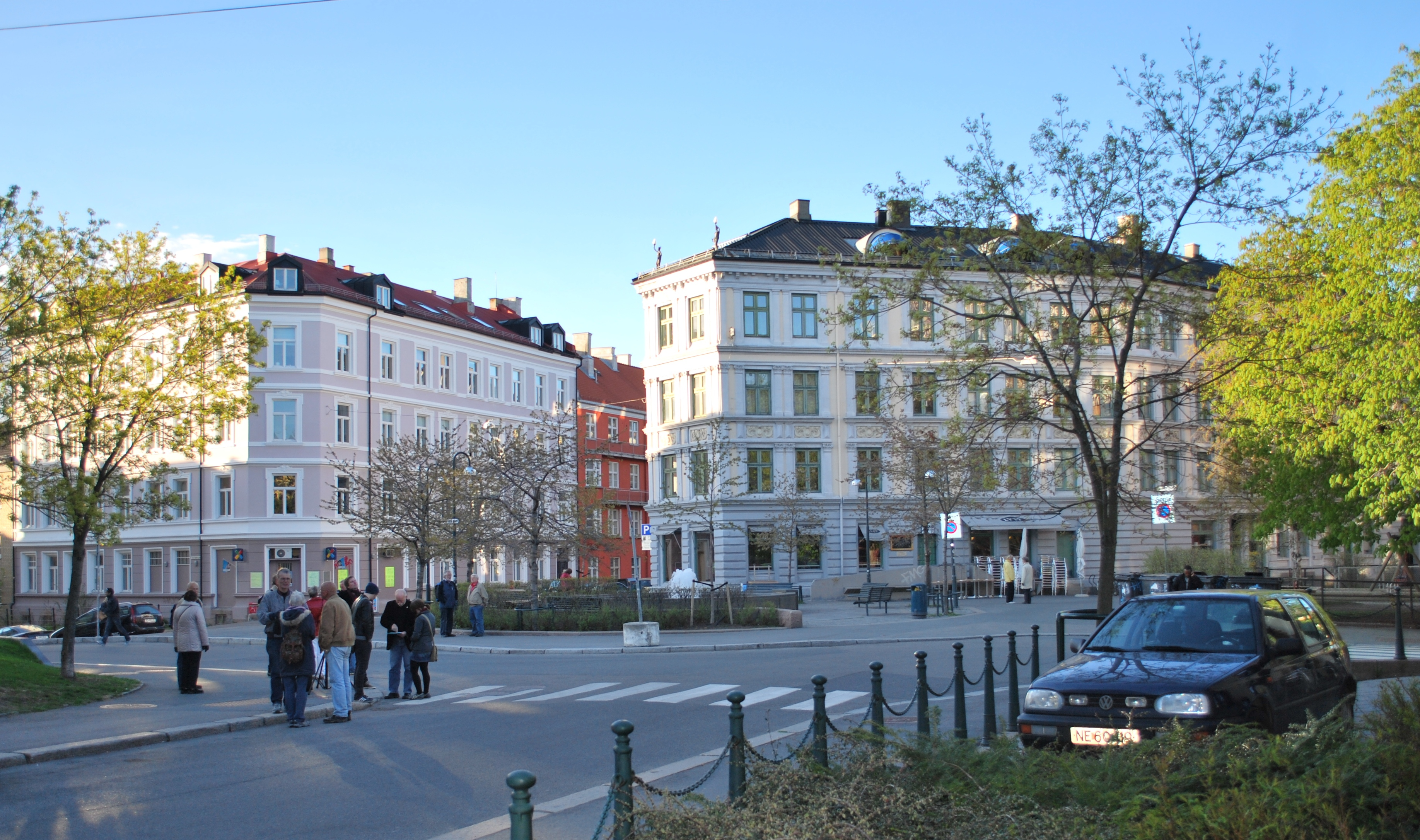 Sørli plass, Enerhaugen, Oslo, sett mot vest fra Jens Bjelkes gate